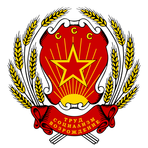 Escudo de Siberia